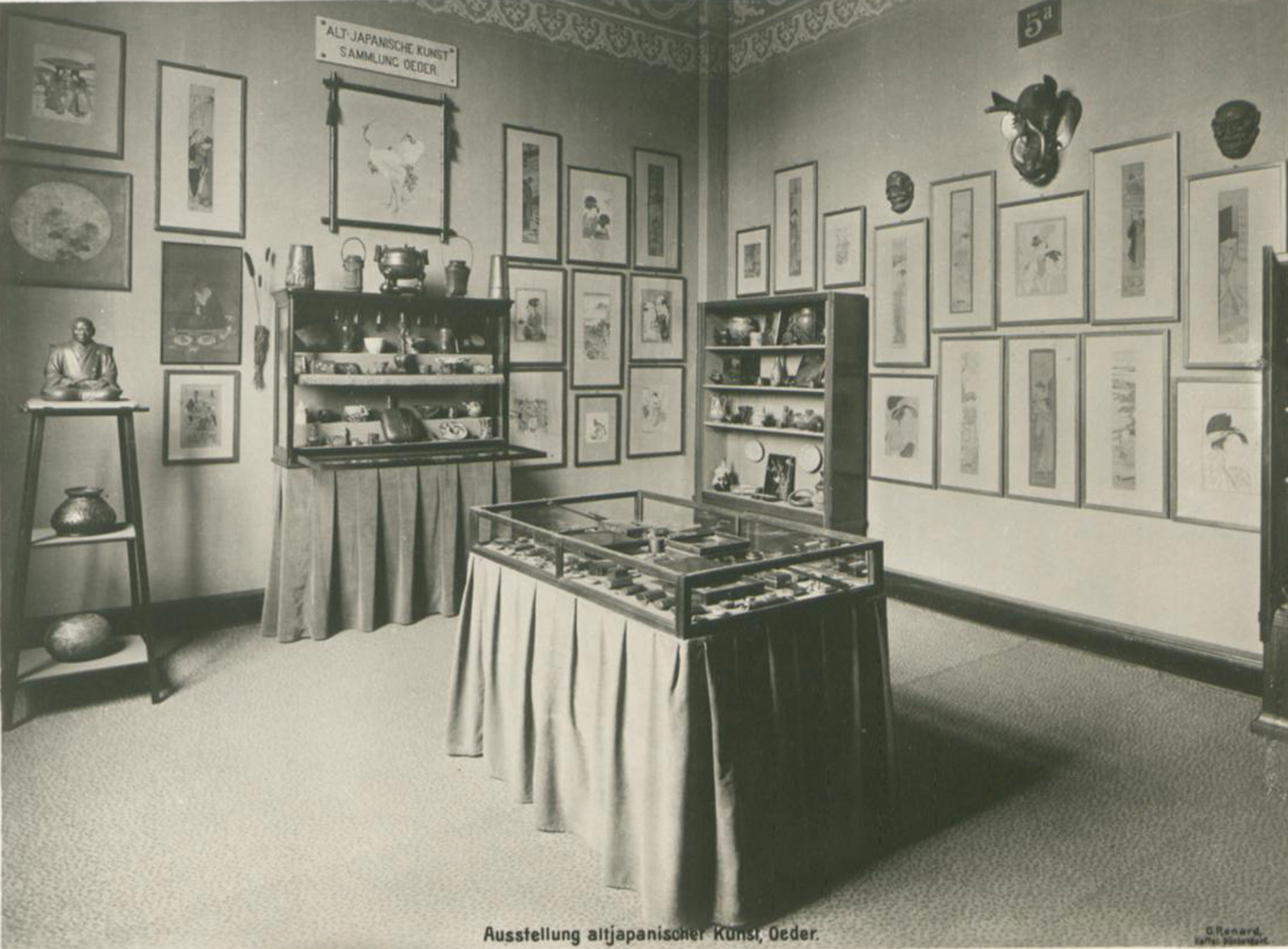 Kunstpalast, Raum 5a Ausstellung altjapanischer Kunst, Georg Oeder, Foto Otto Renard, 1902